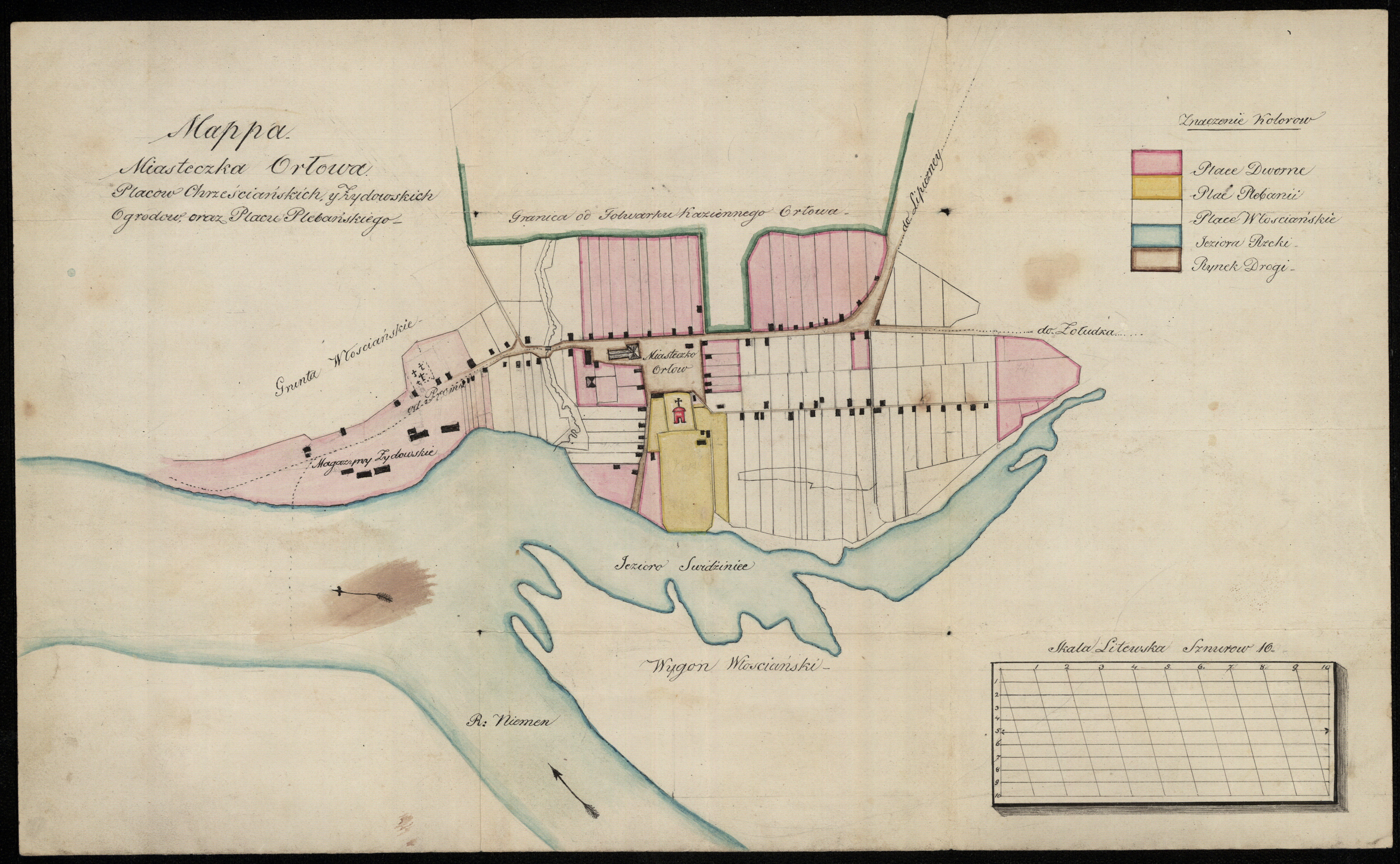 Беларуская (тарашкевіца): Орля (Orla). Плян мястэчка